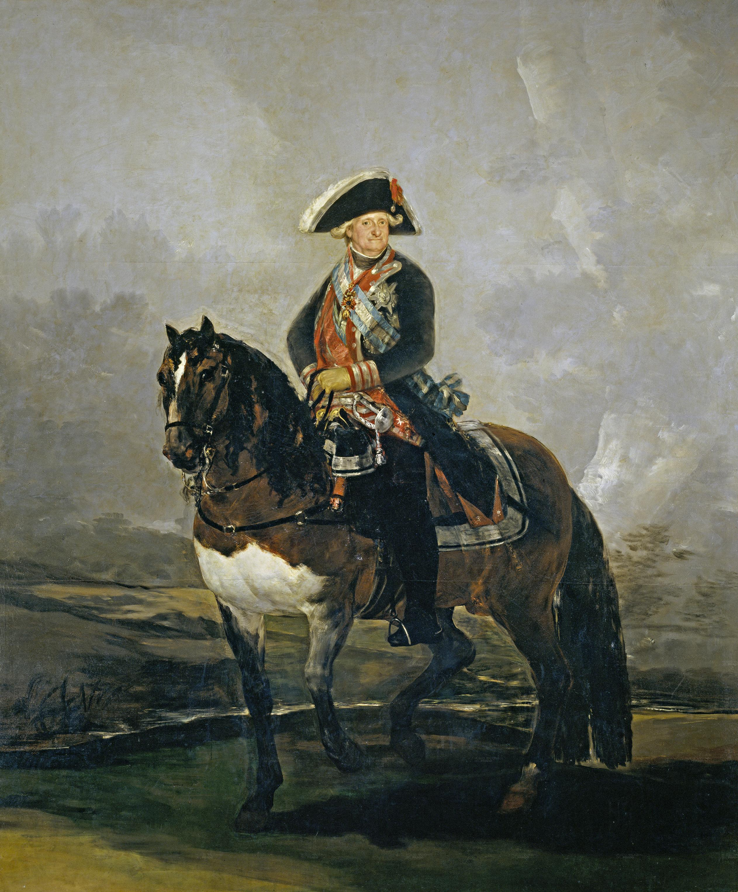 El retratado lleva el uniforme de coronel de los guardias de Corps, la banda de Carlos III, la Orden de San Jenaro y el Toisón de Oro.